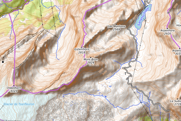 carte réalisée sur umap This map may be incomplete, and may contain errors. Don't rely solely on it for navigation.